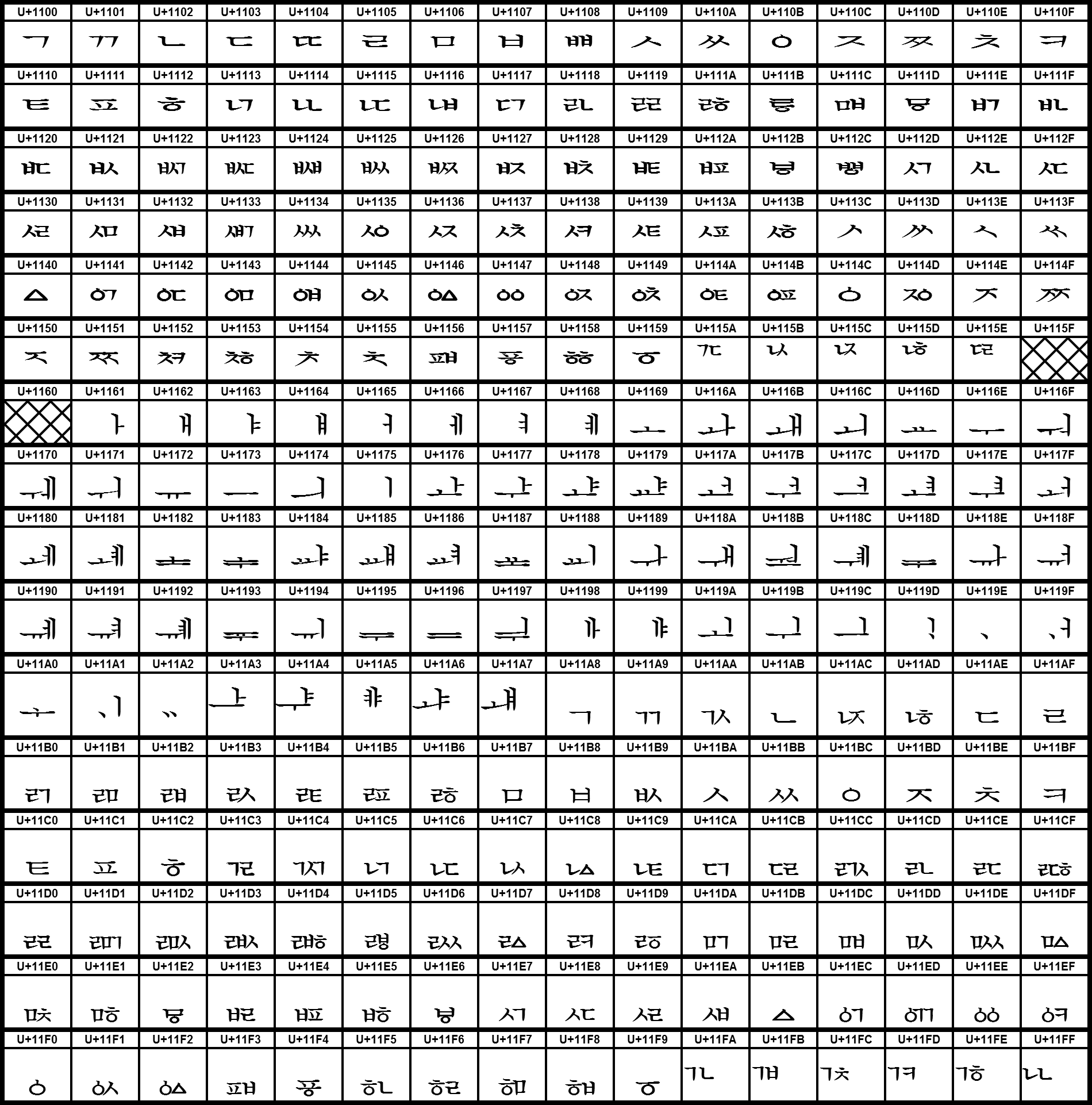 Grafiktafel für den Unicodeblock Hangeul-Jamo. Doppelt schraffierte Felder sind Kontrollzeichen